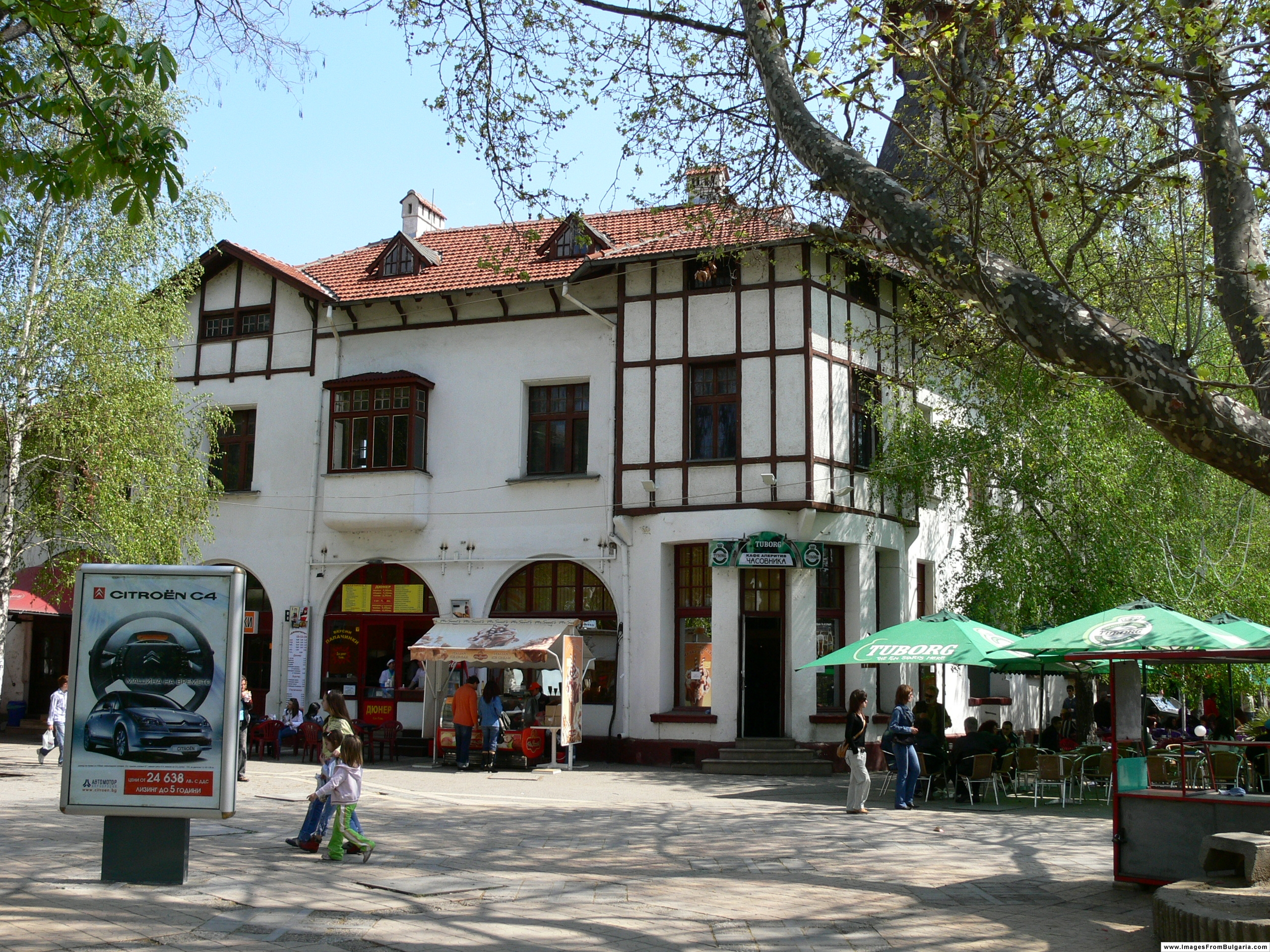 Pazardzhik, Bulgaria